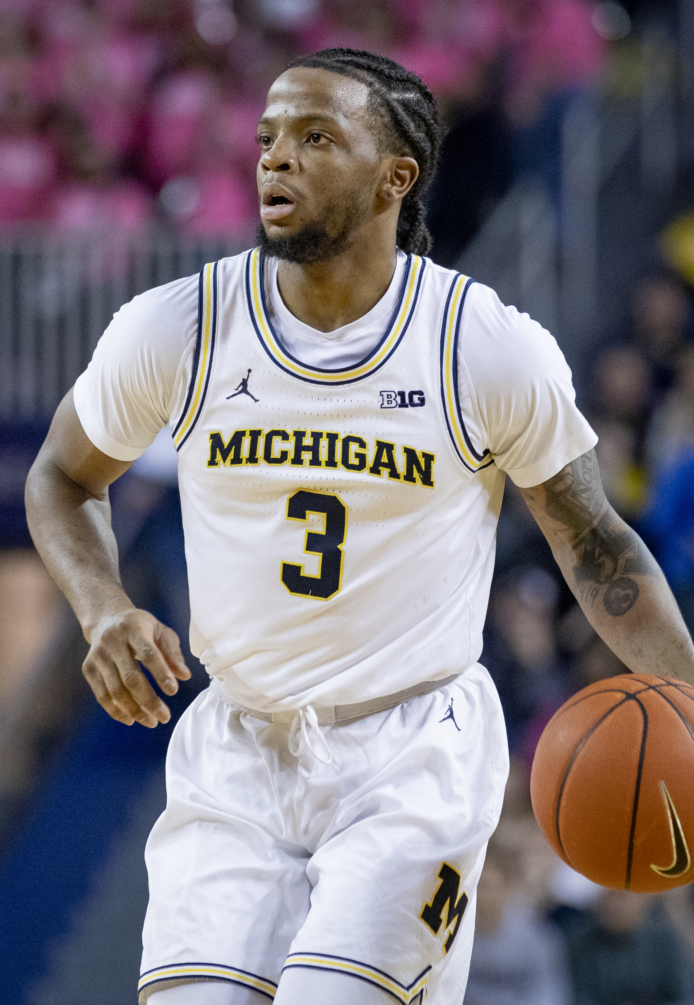 4O6A9651